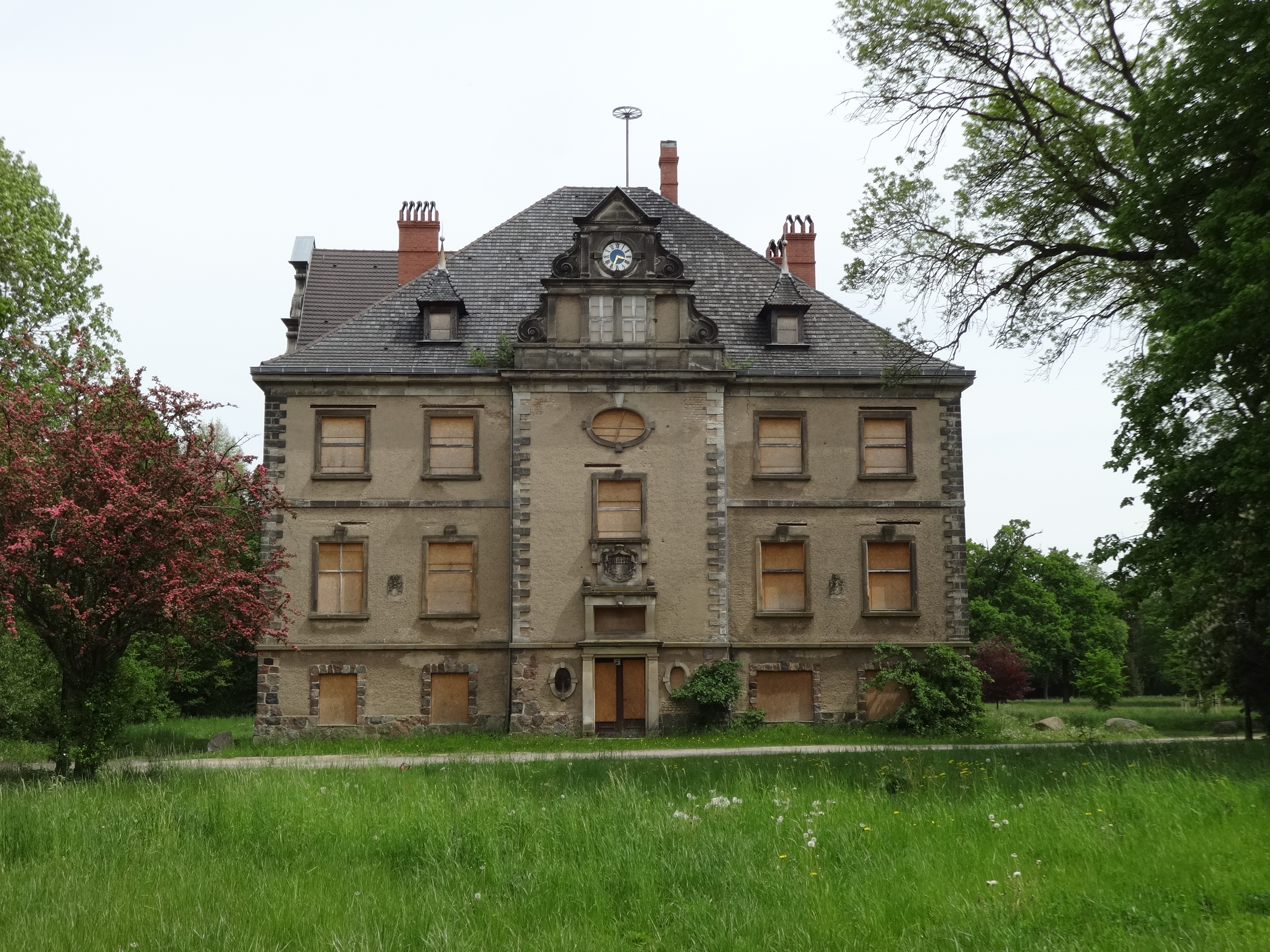 Neues und altes Schloss in Baruth/Mark mit einem von Lenné geplanten Schlosspark